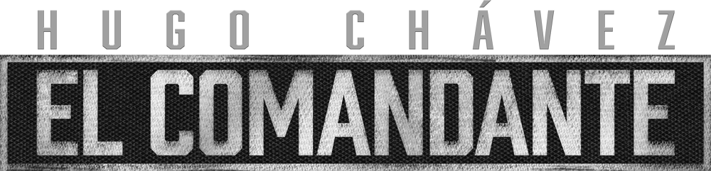 Logo de El Comandante